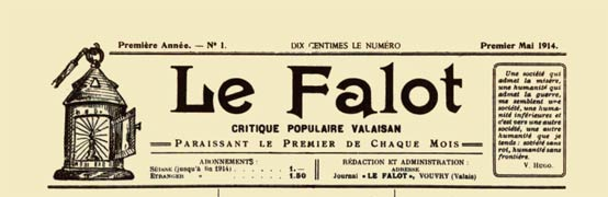 "Le Falot" ou "Le Falot - Il fanale", sous-titré « critique populaire valaisan », est un journal suisse anarcho-syndicaliste bilingue français-italien1 créée le 1er mai 1914 par le syndicaliste libertaire Clovis Pignat.